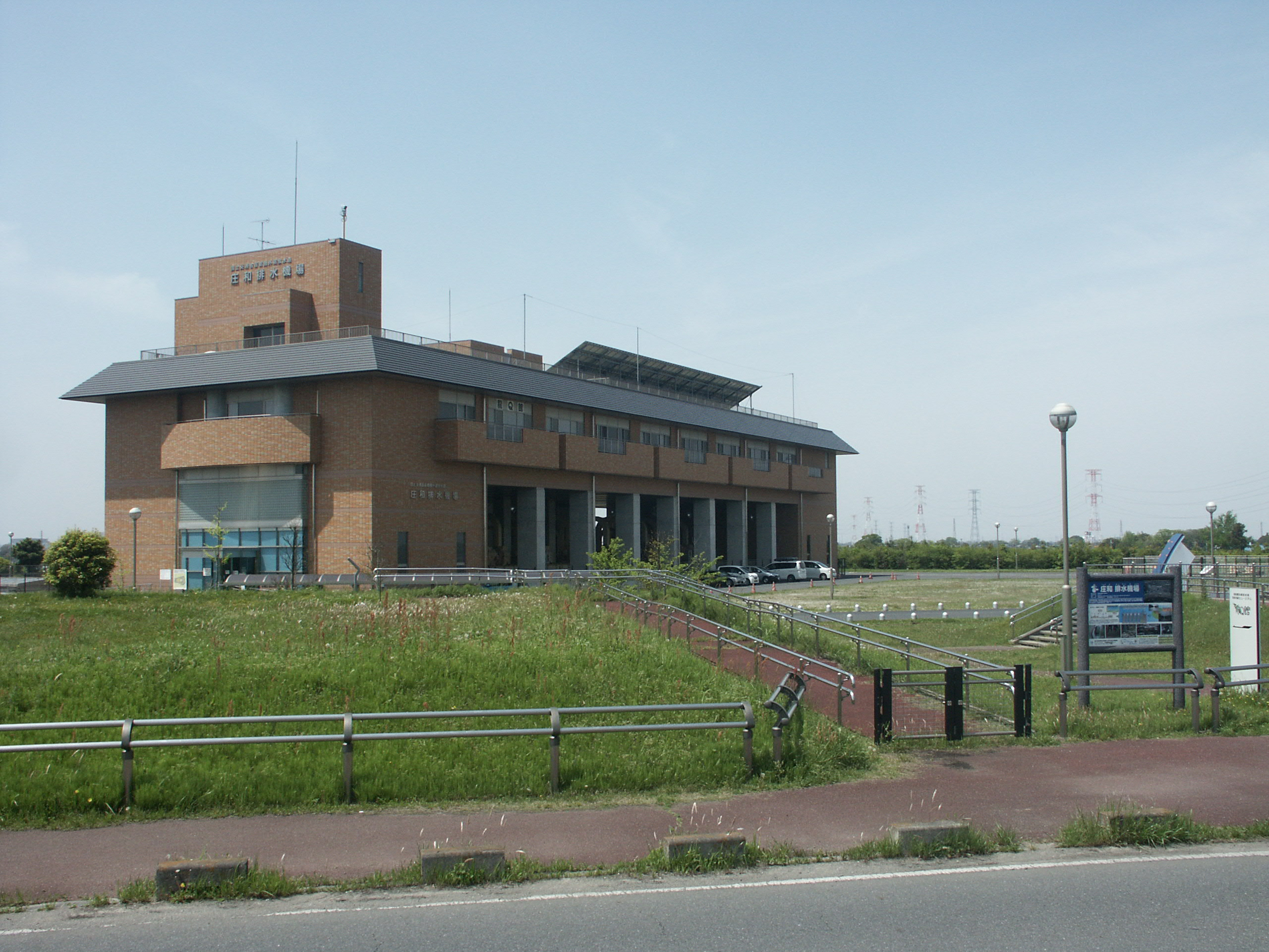 首都圏外郭放水路庄和排水機場